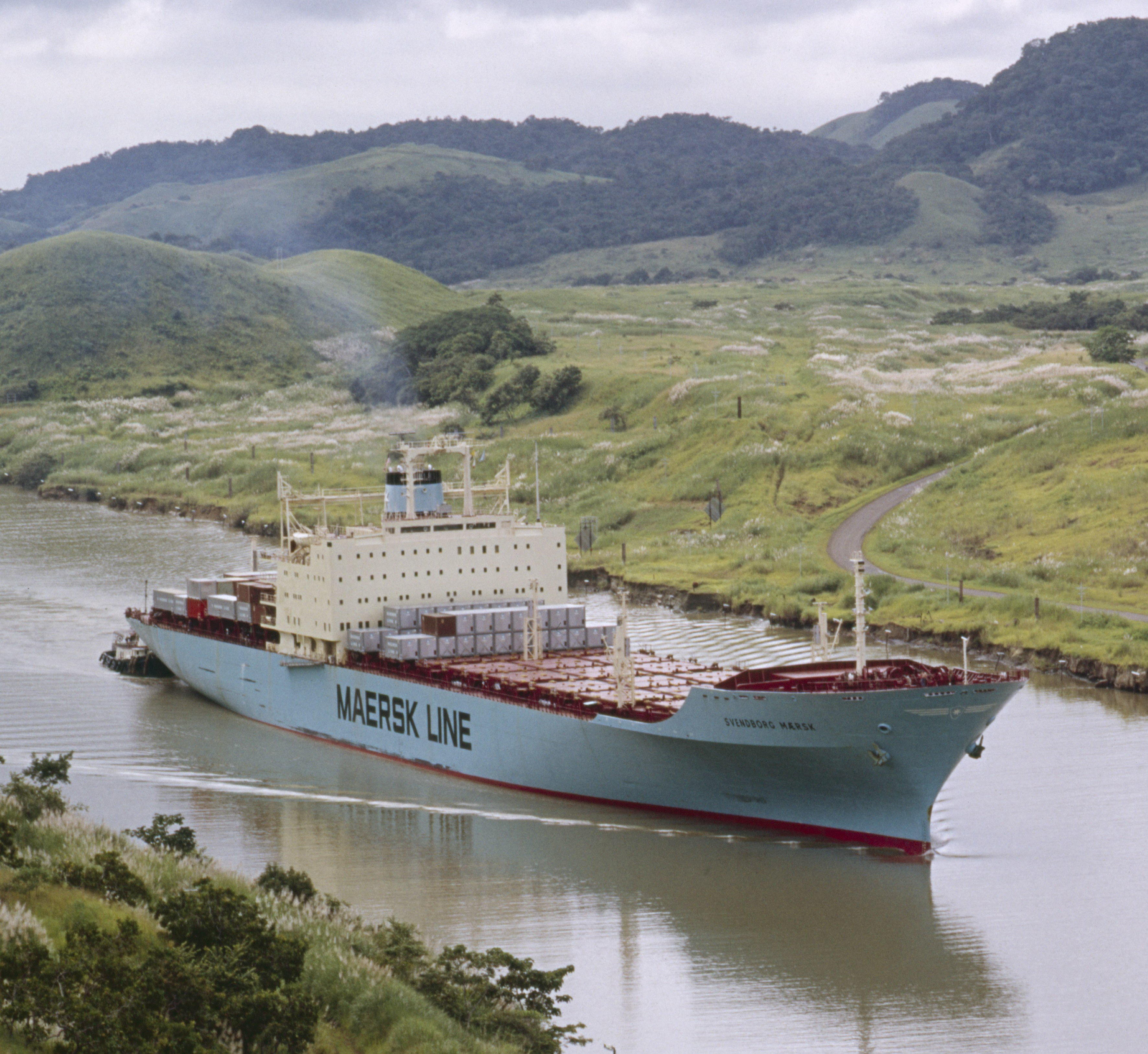 Svendborg Mærsk in the Panama Canal